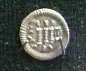 Denár Bély II.